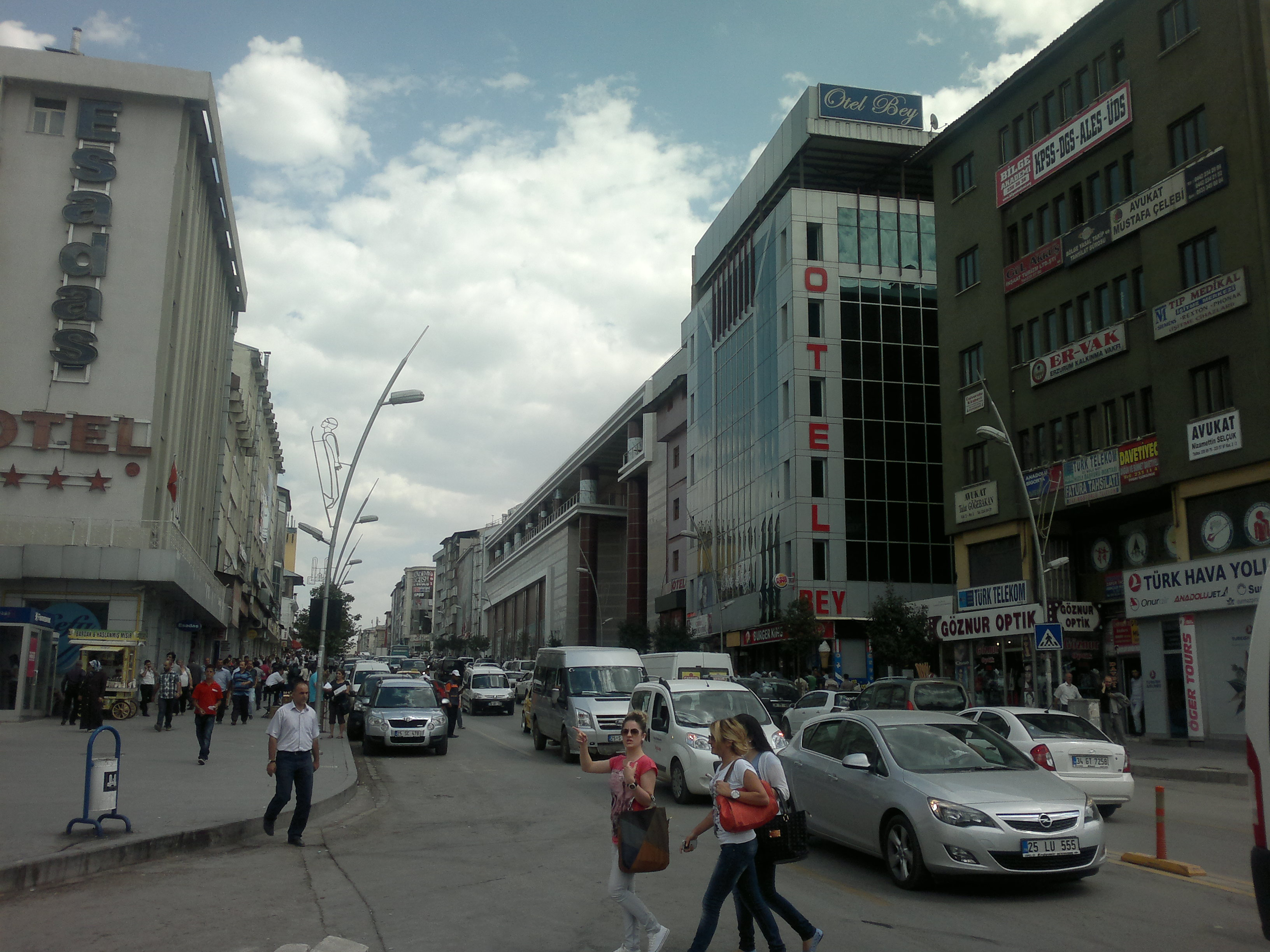 Türkiye'nin Doğu Anadolu Bölgesi'ndeki en büyük ve en kalabalık şehri Erzurum'dan şehir görüntüsü.